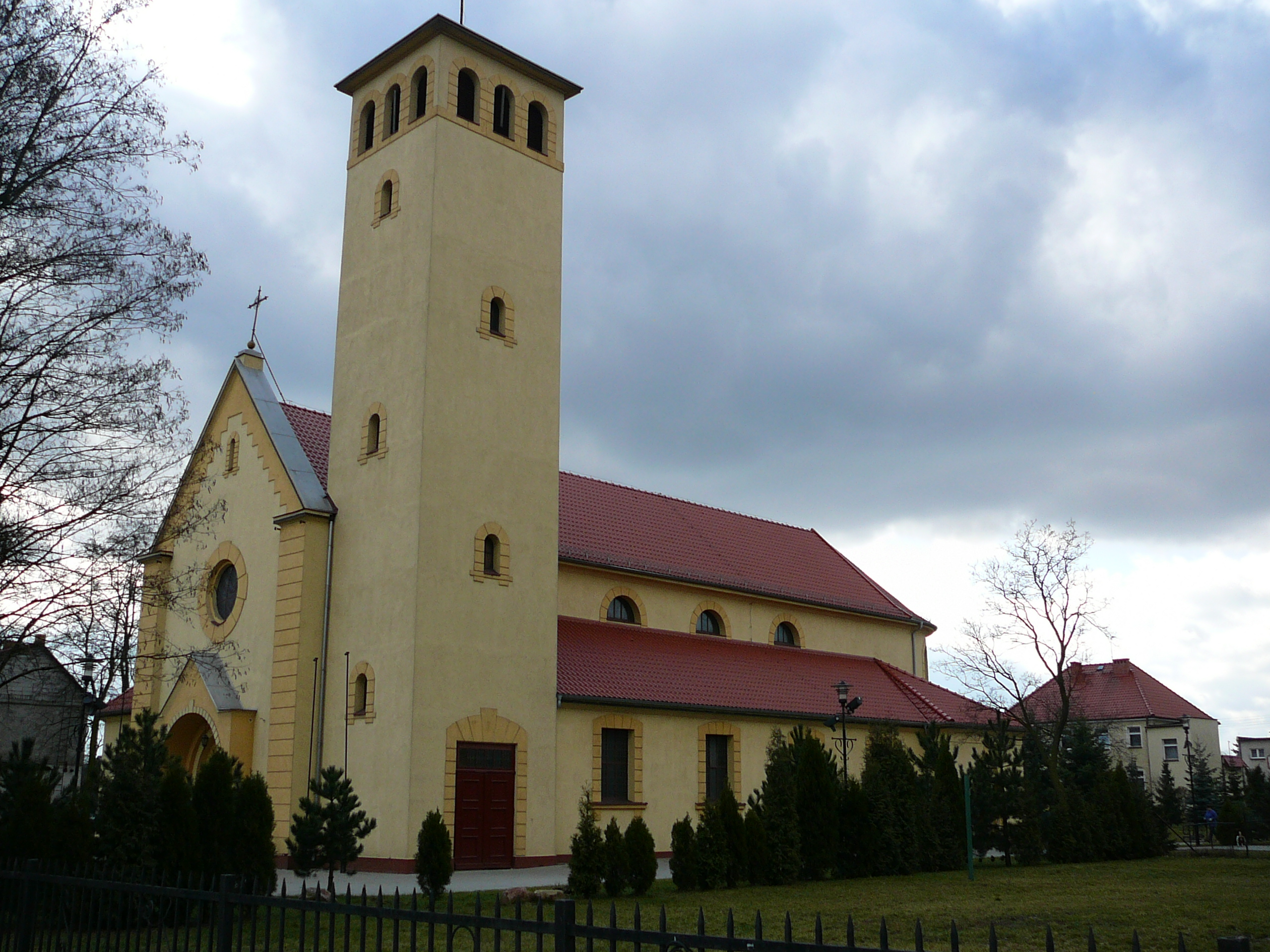 Kościół parafialny pw. św. Jana Bosko w Luboniu.